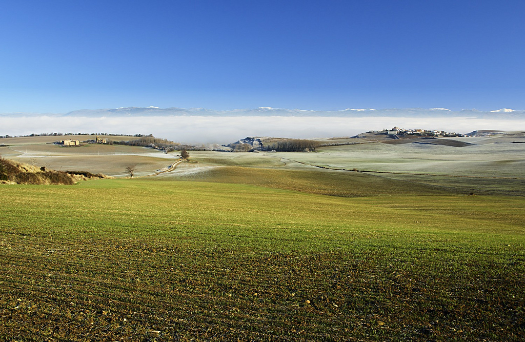 Una vista de la cuenca de Pamplona, desde la Sierra del Perdón, oculta la ciudad bajo un manto de niebla y escarcha. DATOS EXIF: Cámara Pentax K10D. Sigma 18-200mm. Focal: 18 mm. Apertura: F16 Velocidad 1/16s ISO: 100 Iluminación: Natural. Editor: UFRaw + Gimp.